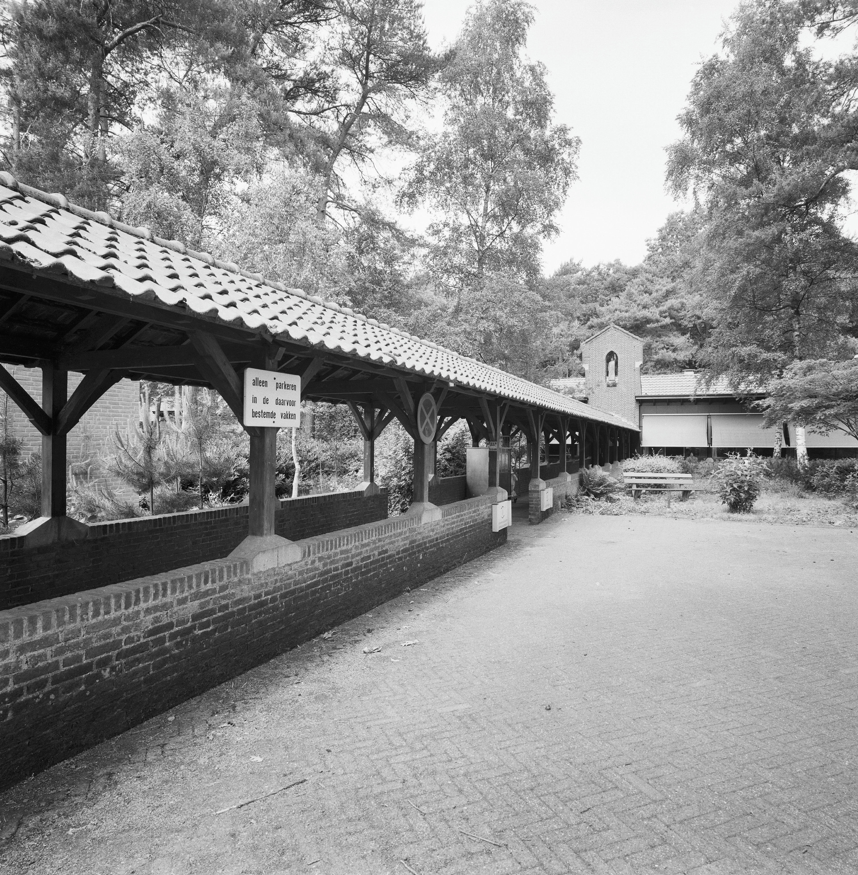 Sanatorium Hornerheide: Overzicht verbindingsgalerij en lighal (opmerking: Gefotografeerd voor Monumenten In Nederland Limburg)